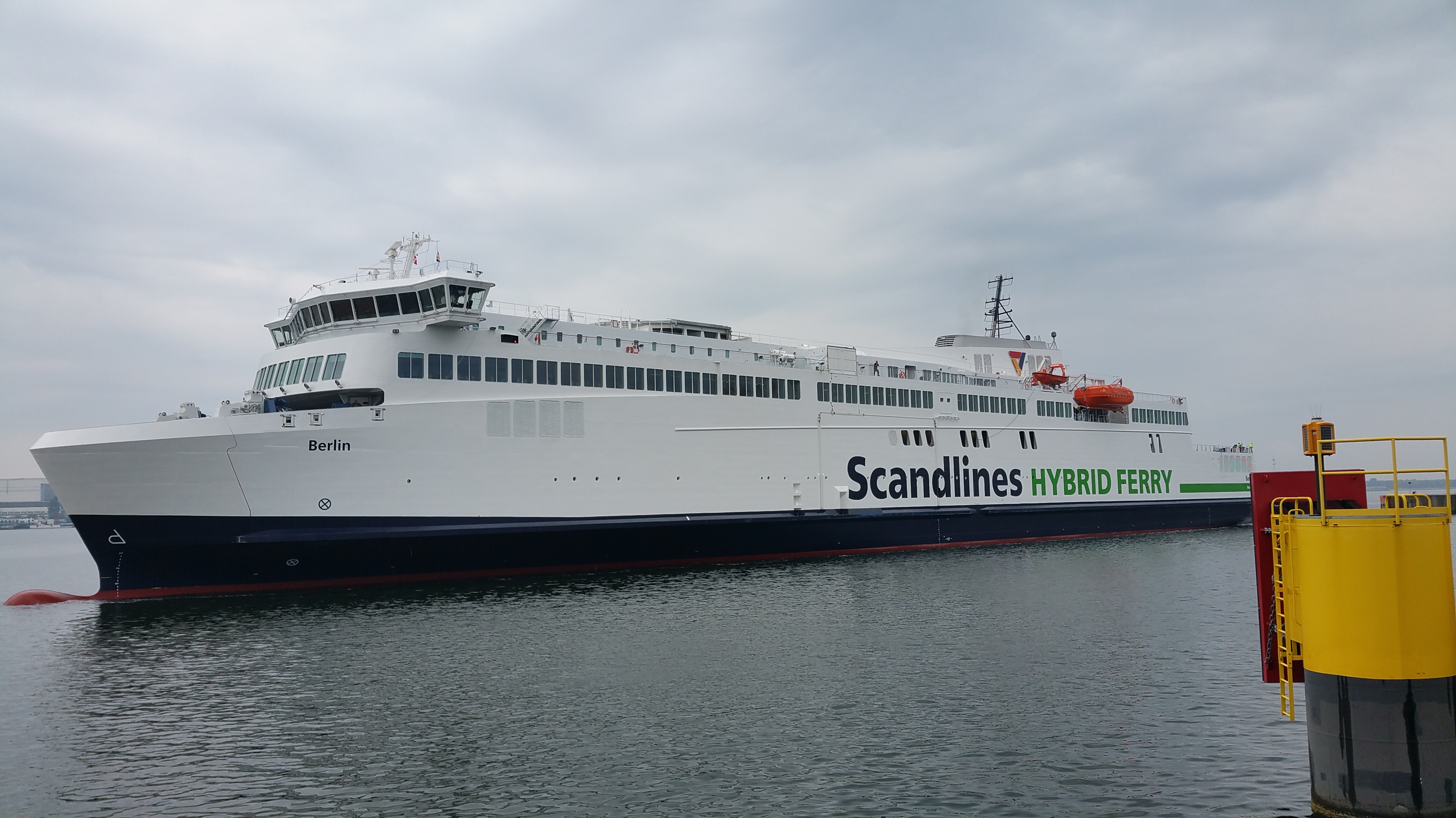 Fähre Berlin im Rostocker Fährhafen